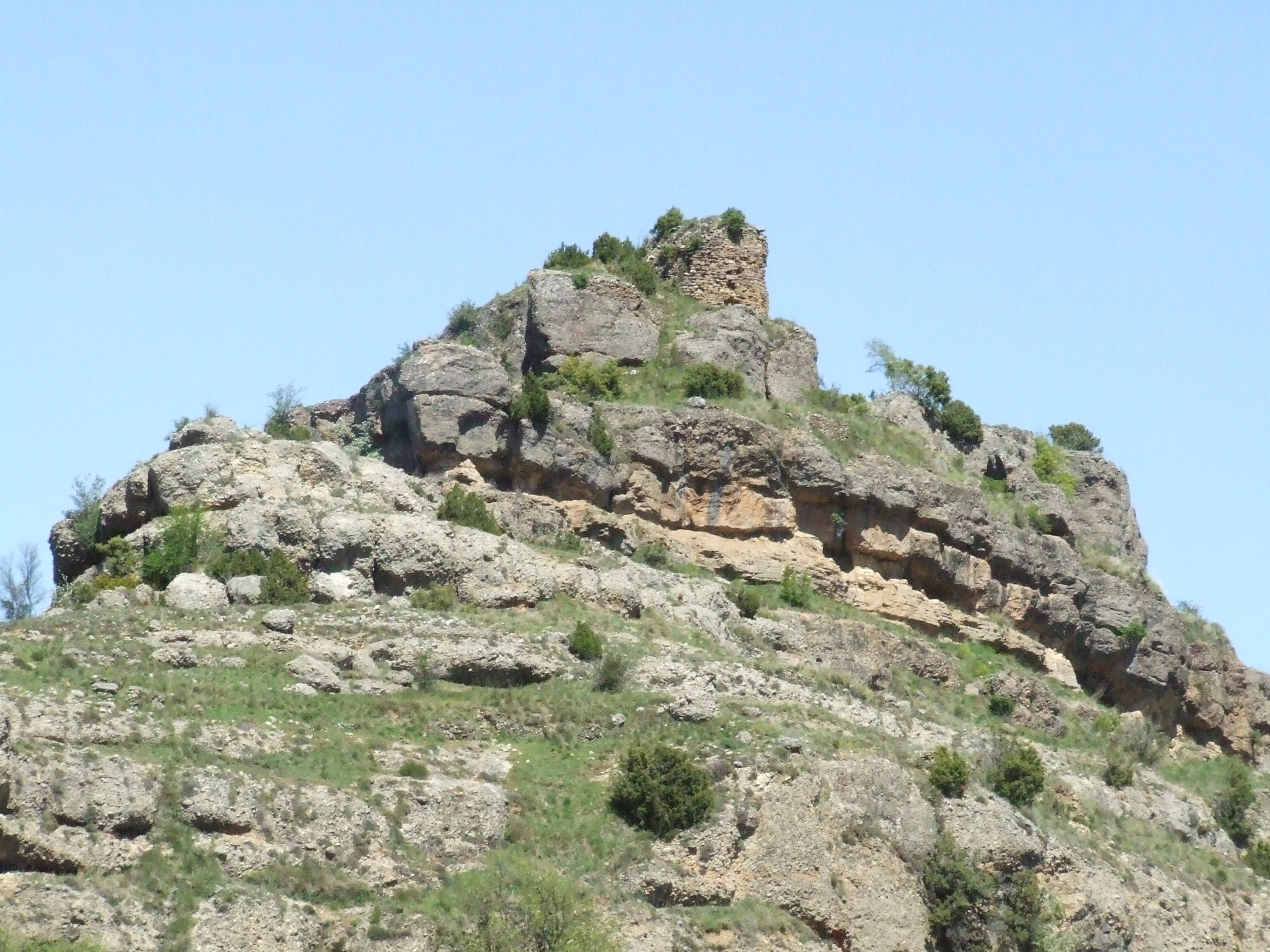 El Castell de Toralla (Toralla i Serradell, Conca de Dalt, Pallars Jussà)